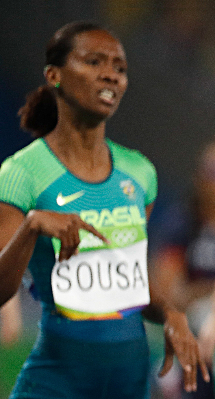 Rio de Janeiro - Eliminatórias do revezamento 4 x 400m nos Jogos Rio 2016, no Estádio Olímpico (Fernando Frazão/Agência Brasil)